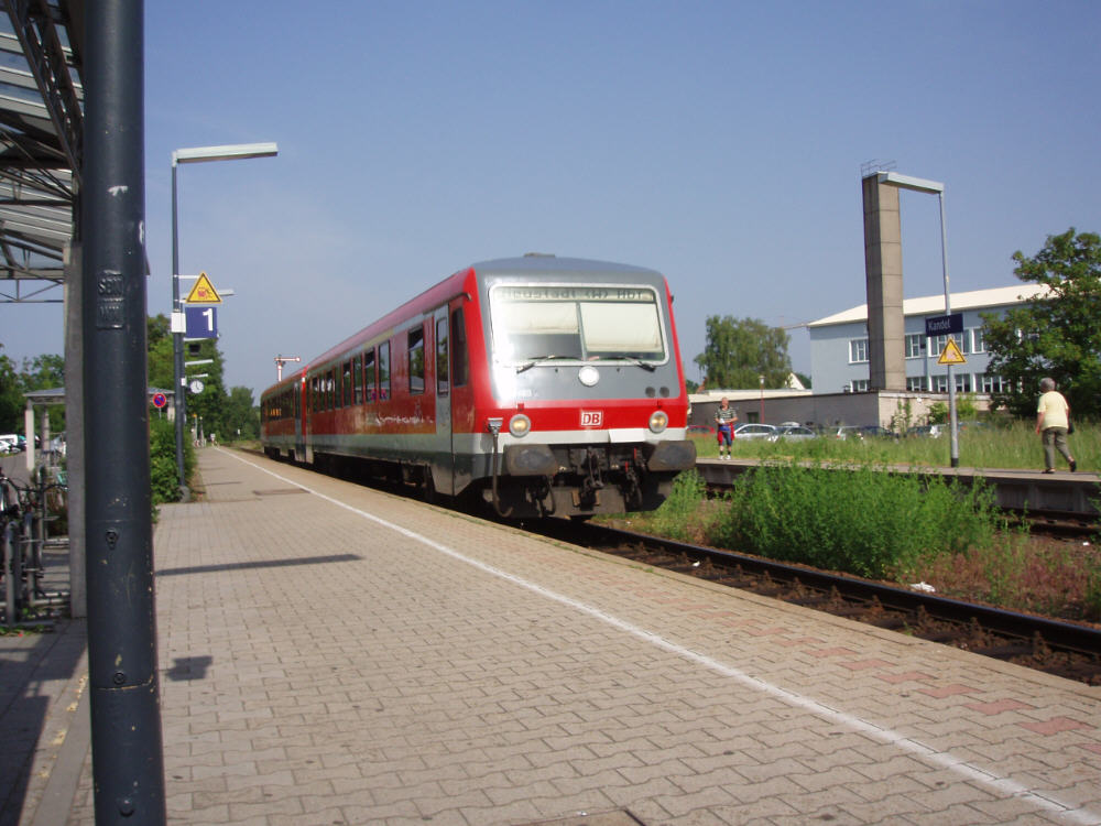 Bahn nach Neustadt bei der Einfahrt in den Bahnhof Kandel